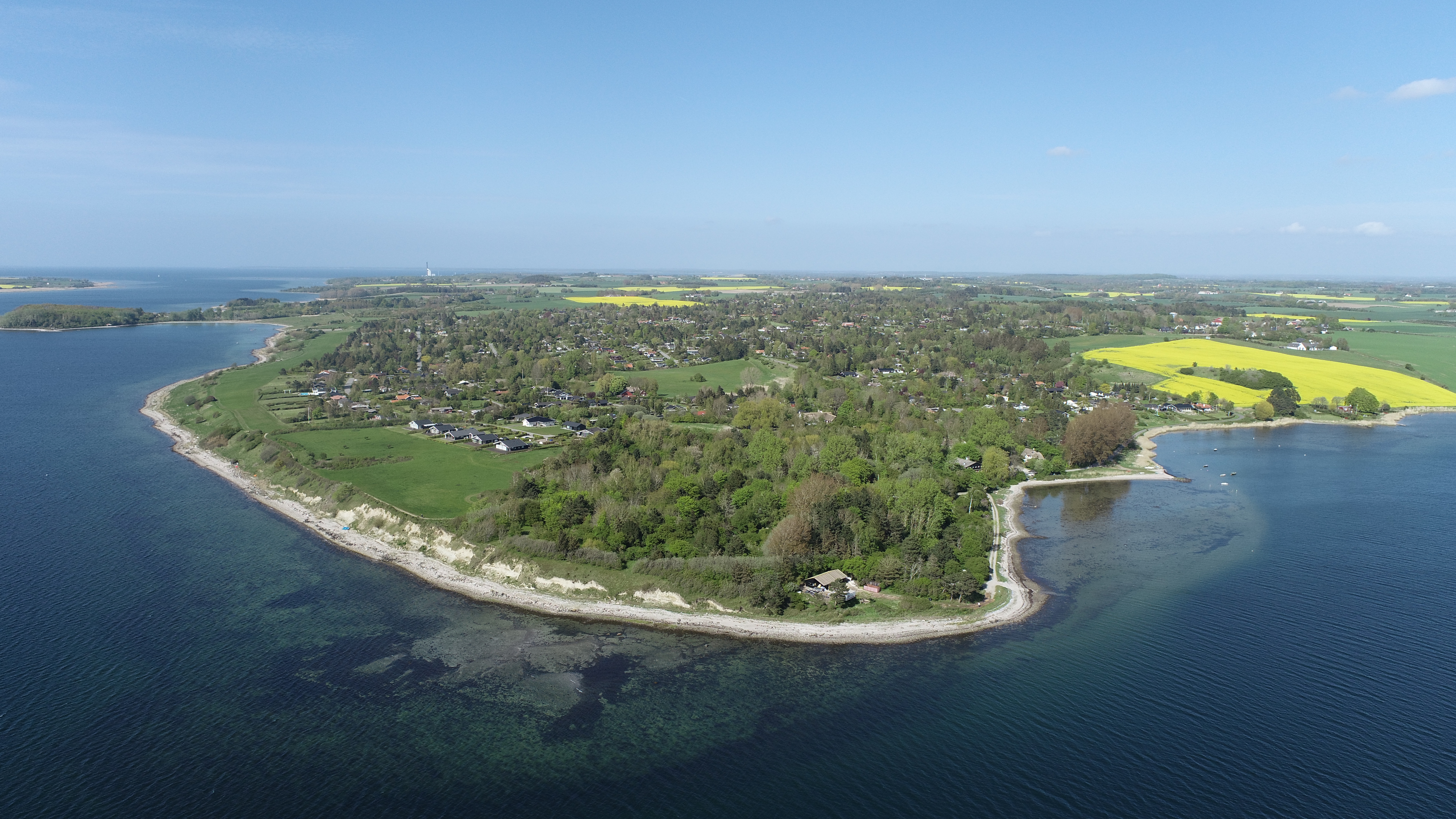 Luftfoto af Vellerup Sommerby set fra Isefjorden ved Vellerup Vig